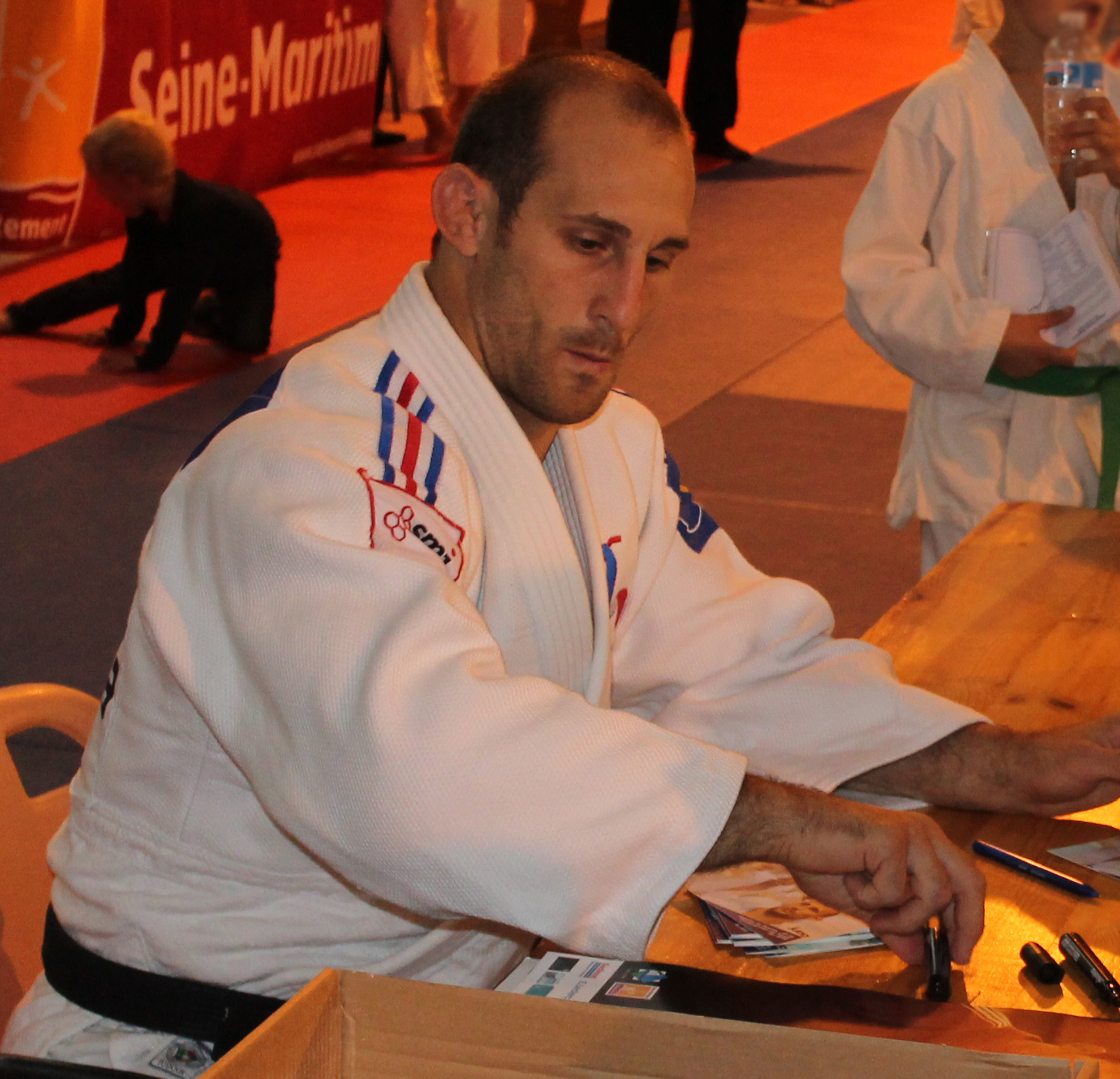 Le Judoka Français Alain SCHMITT lors de l'Euro-judo de Criel-sur-mer (Seine-Maritime, Normandie, France) le 4 octobre 2014.